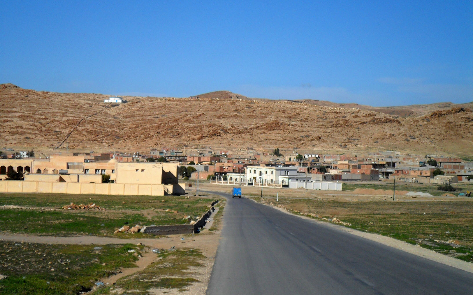 Ain Ouksir عين اوقصير